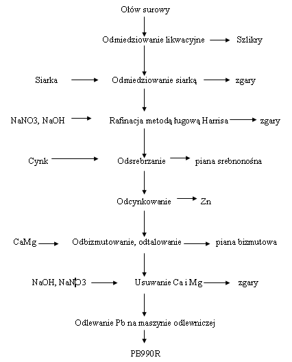 Schemat procesu rafinacji olowiu